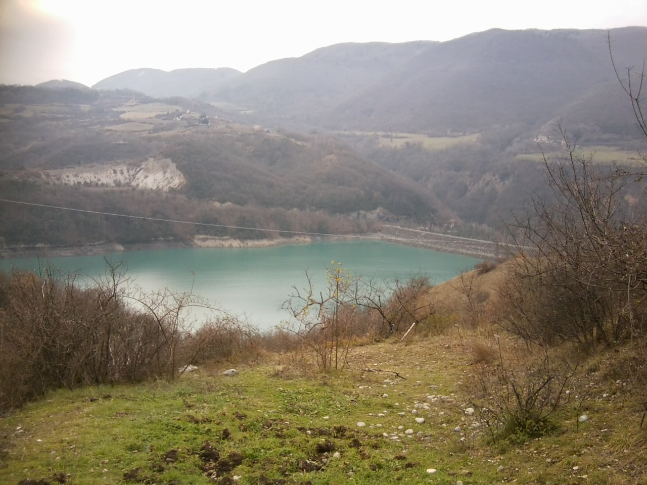 Lac de Notre-Dame-de-Commiers (38) : Vue en direction du barrage de Notre-Dame-de-Commiers.